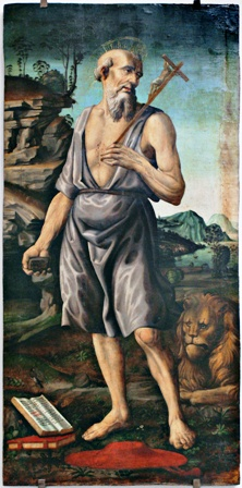 San Girolamo